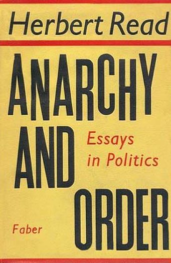 Herbert Read, Anarchy & Order, 1938. Couverture de l'édition de 1953.